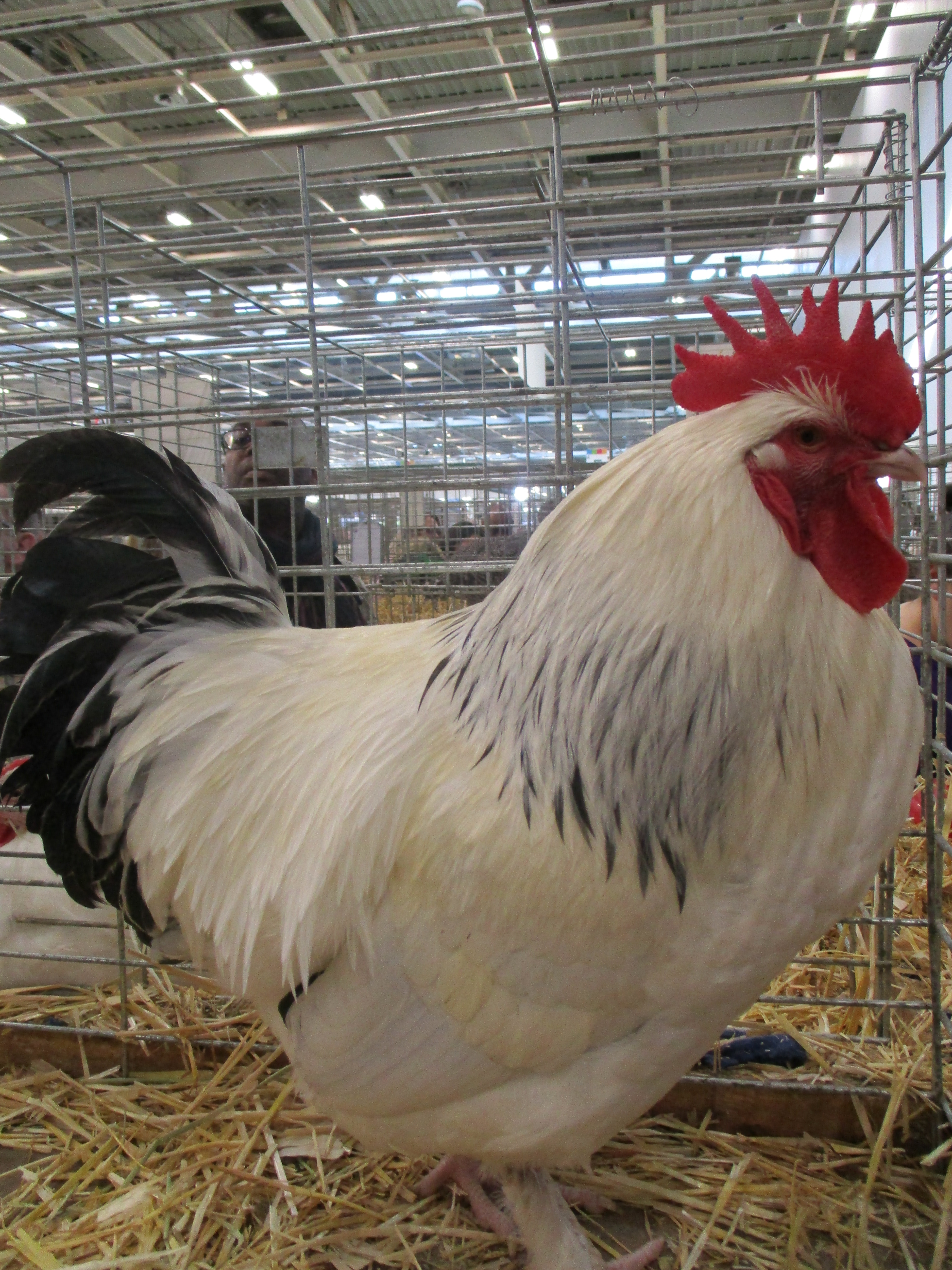 Coq de Bourbourg. SIA 2019.